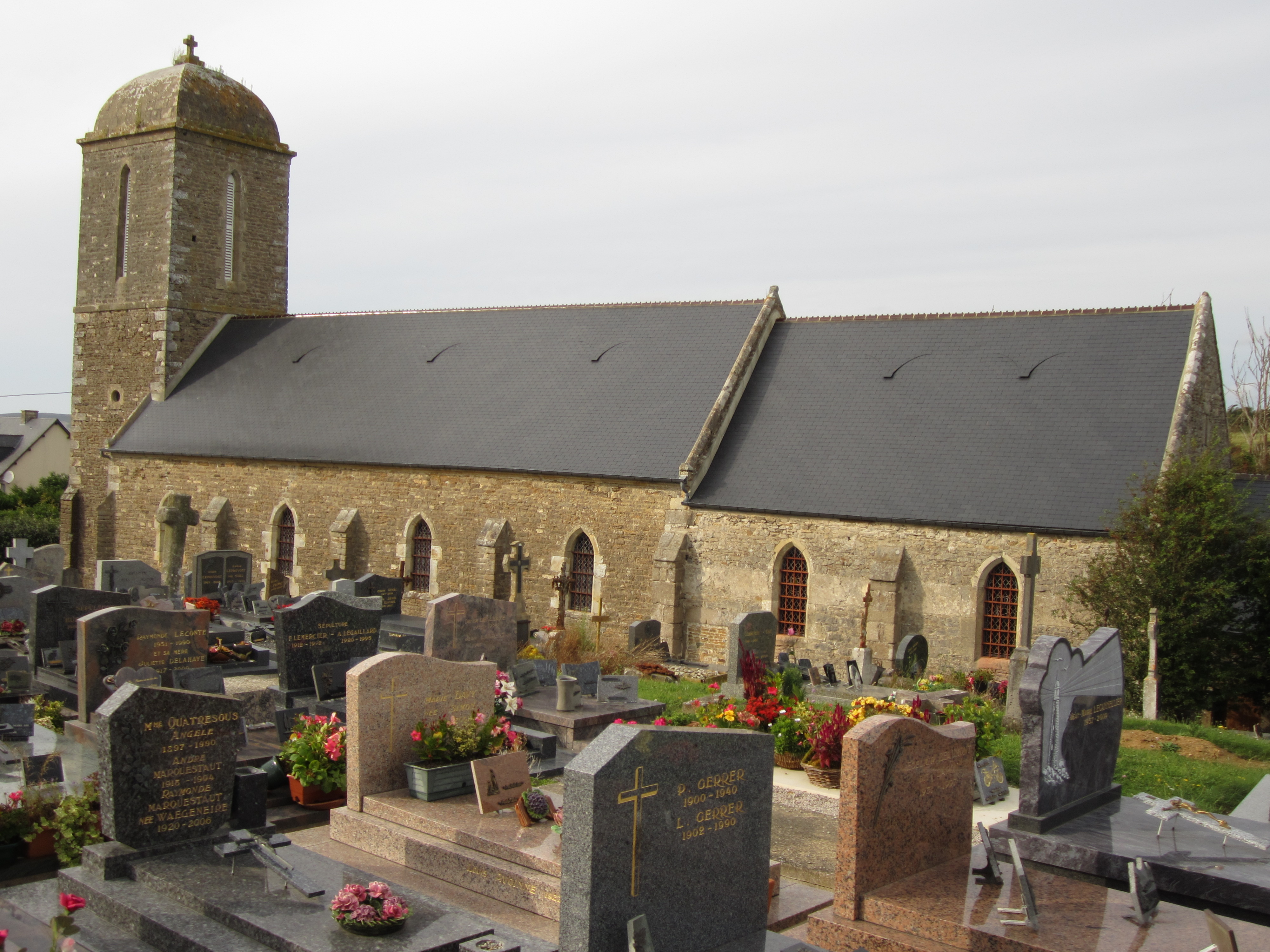 Église Saint-Martin de Baubigny_(Manche)